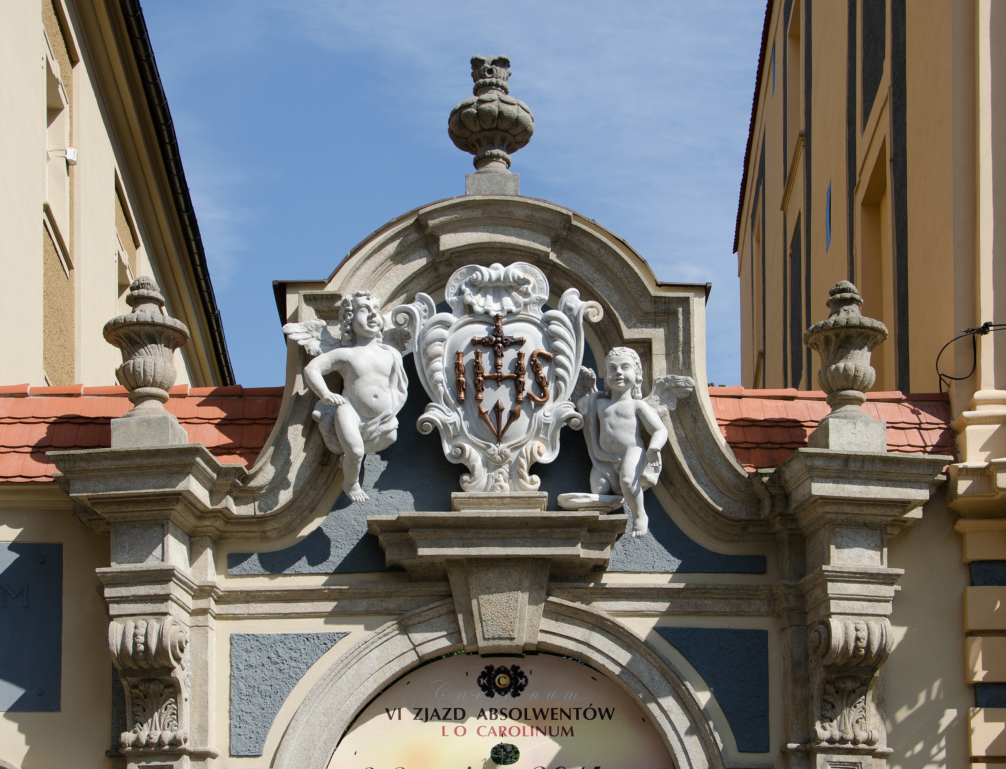 Nysa, brama, 1725